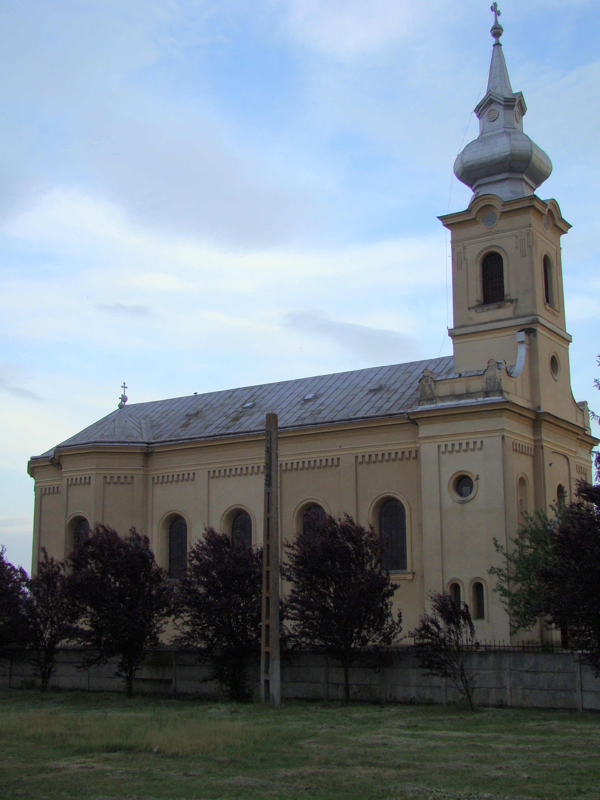 Biserica greco-catolică din Rădești